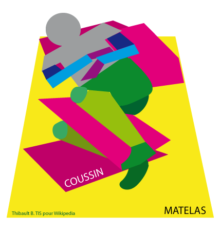 Position allongée à adopter pour éviter les escarres